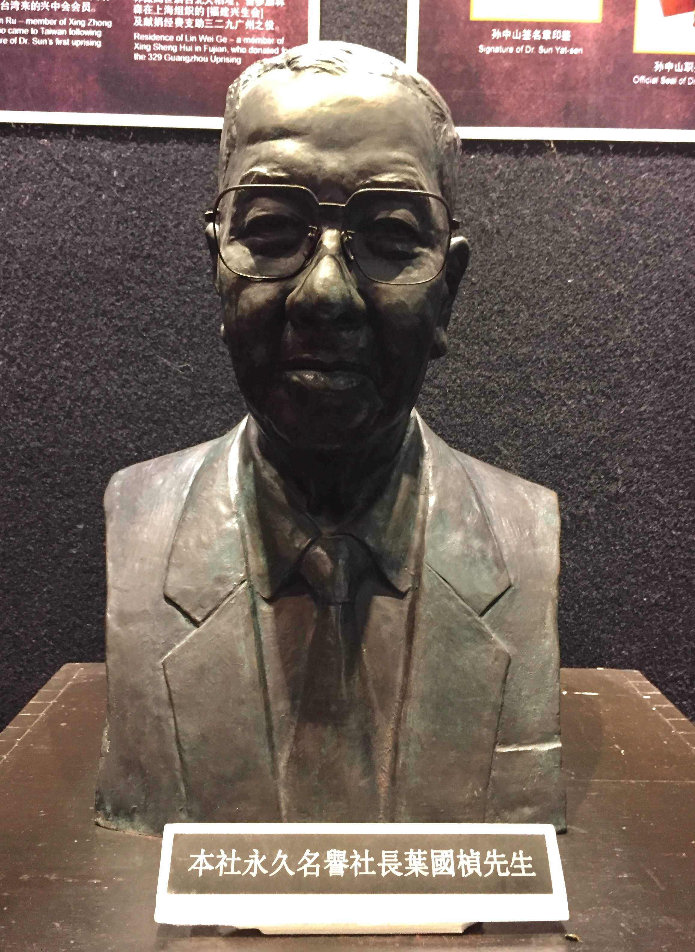 槟城阅书报社永久名誉社长叶国桢半身铜像